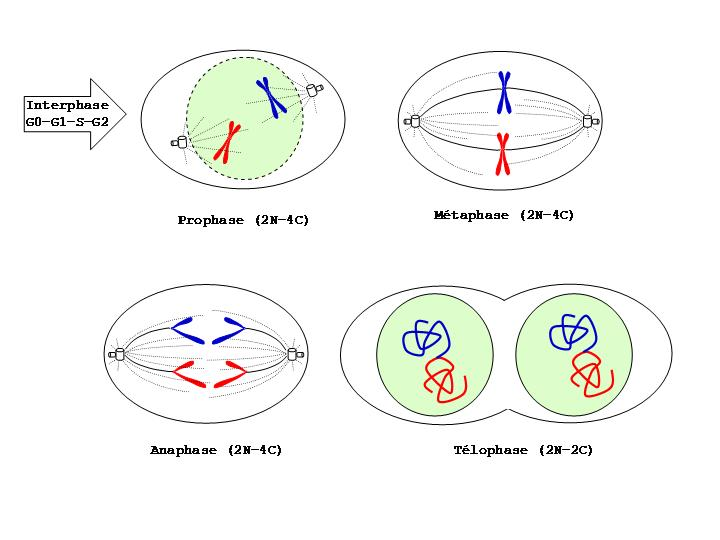 Description: Les différentes étapes de la mitose pendant le cycle cellulaire . Source: dessin original Auteur: Michel Hamels Michel Hamels 18 août 2006 à 17:54 (CEST)